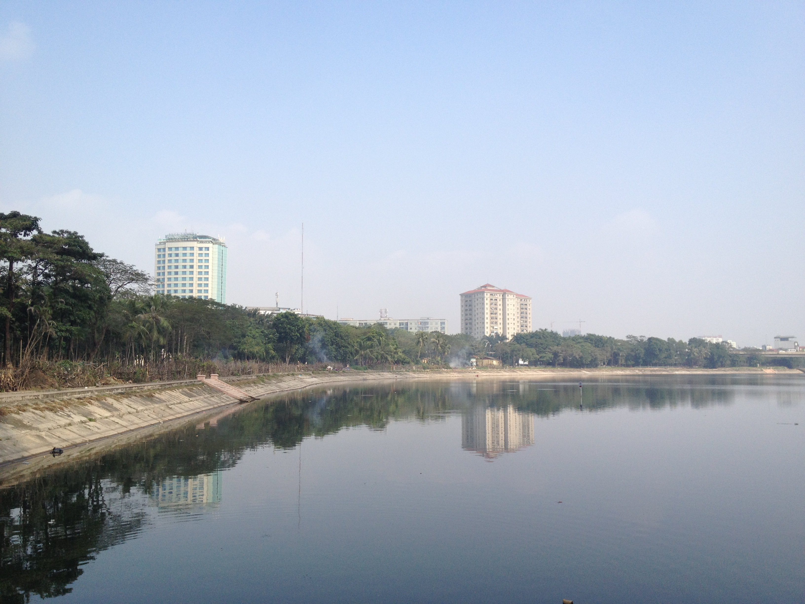 Hà Nội, Việt Nam.